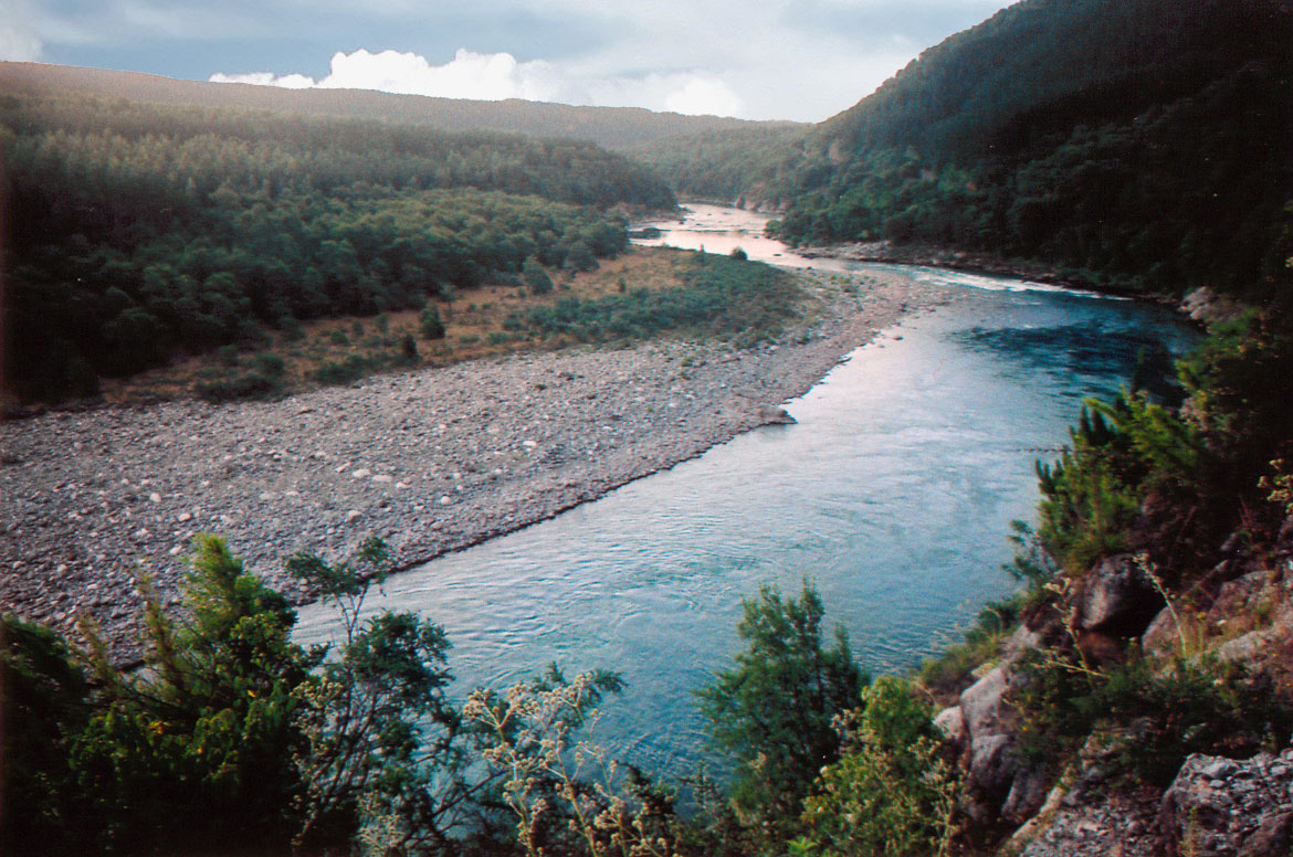 El río Bío-Bío, en Chile.